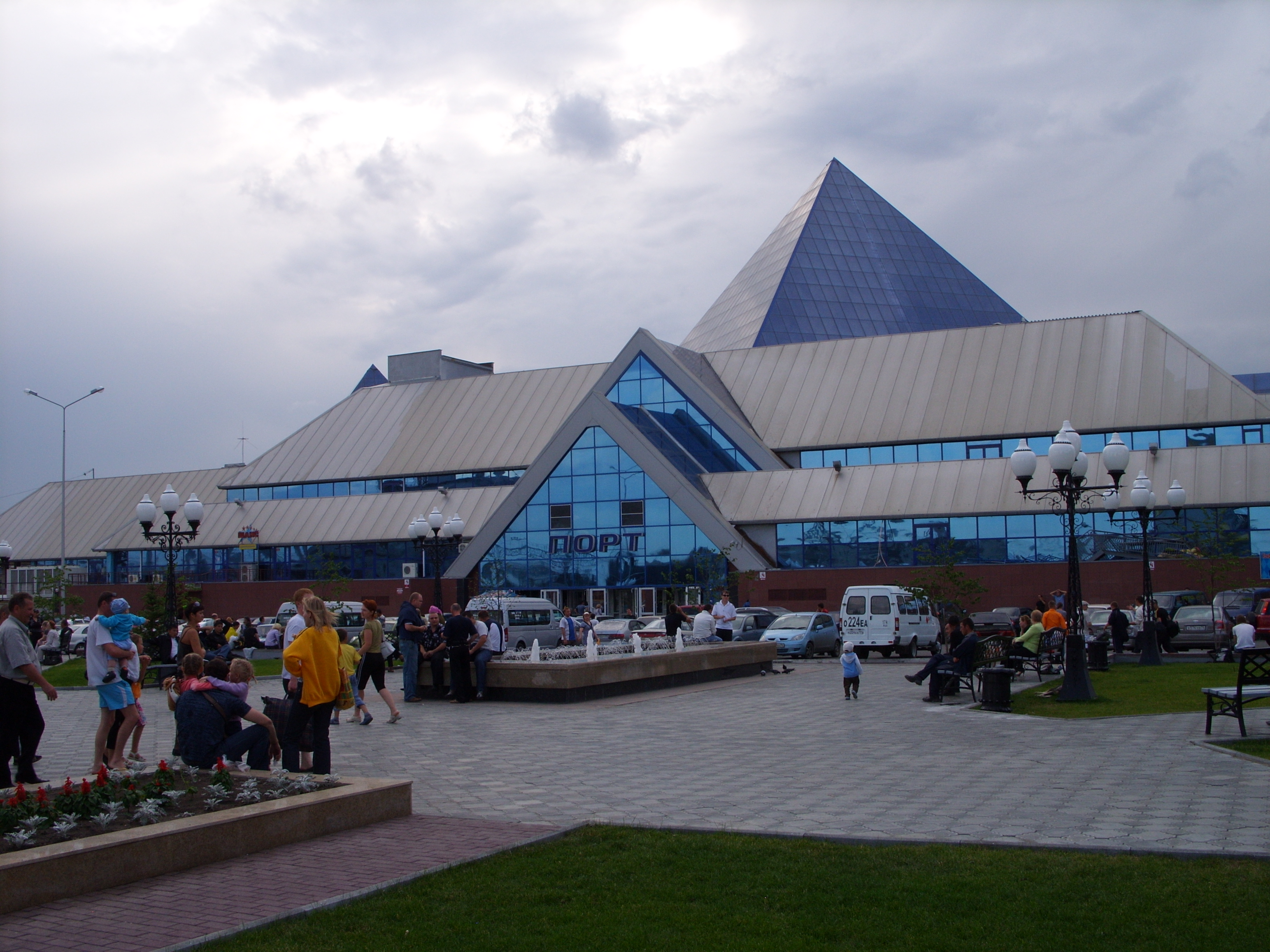 снимки июля 2009 г.